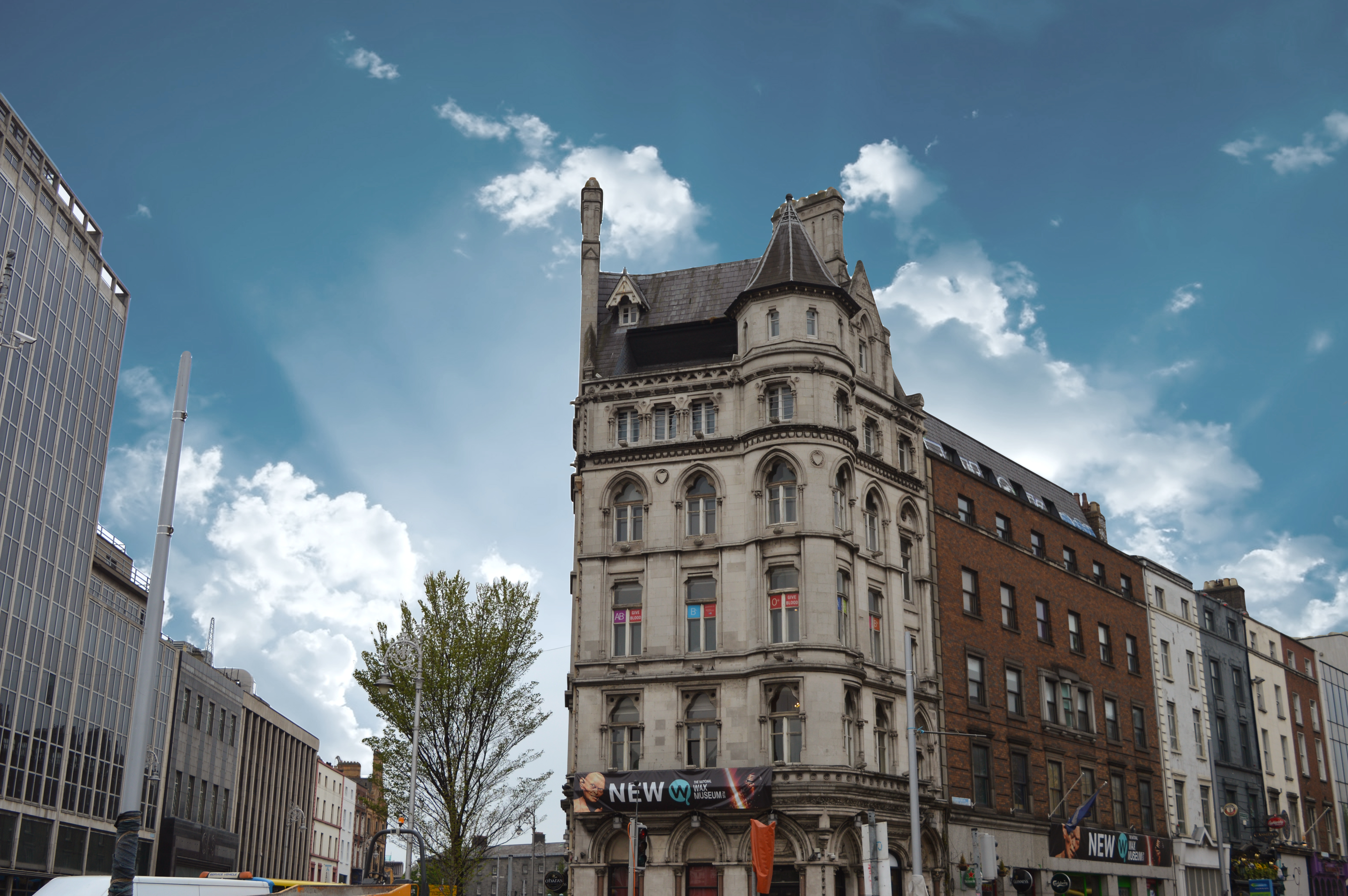 Neuer Standort des National Wax Museum Plus in Dublin